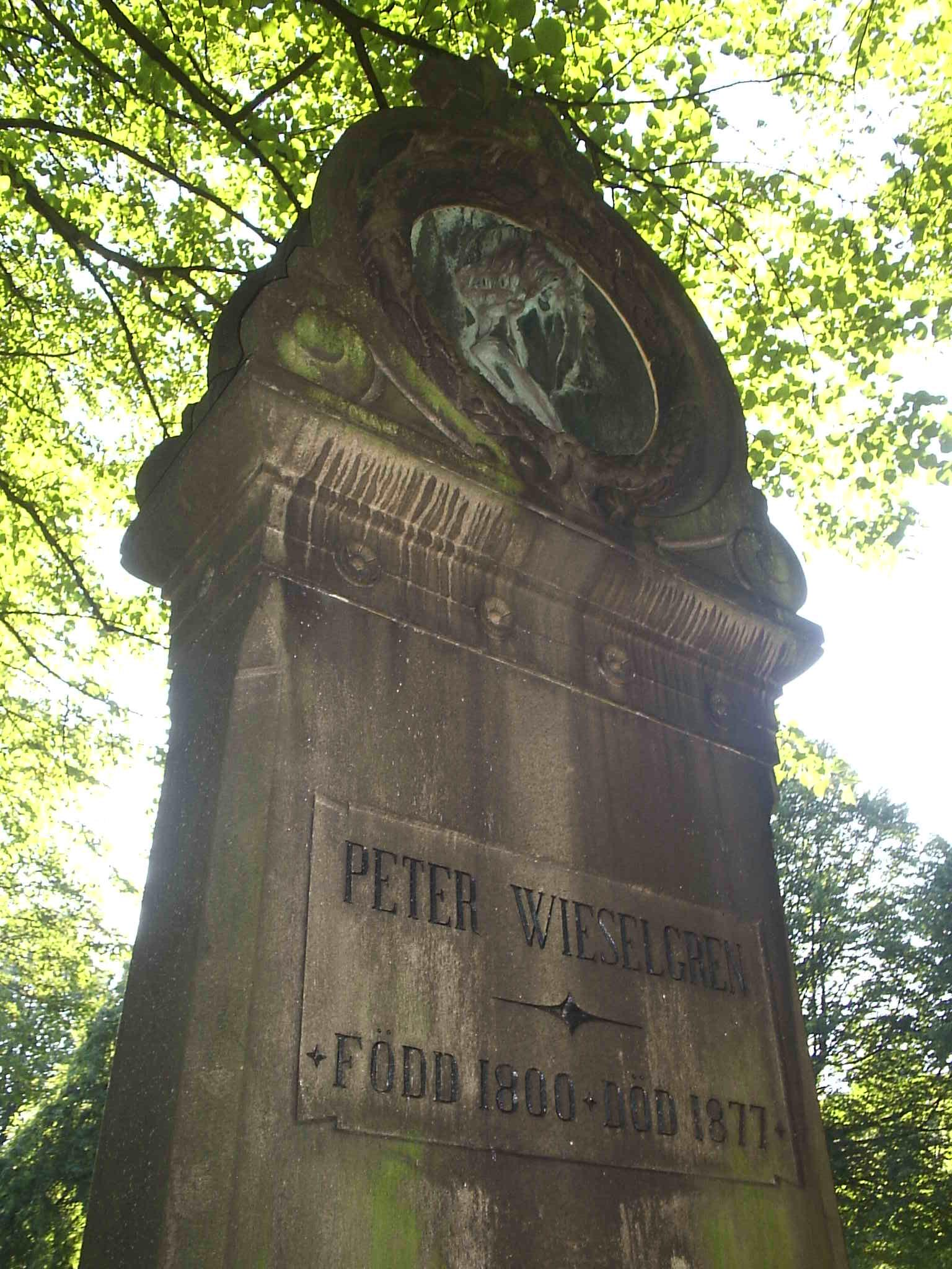 Bilden är fotograferad av Harri Blomberg. Photo by Harri Blomberg.